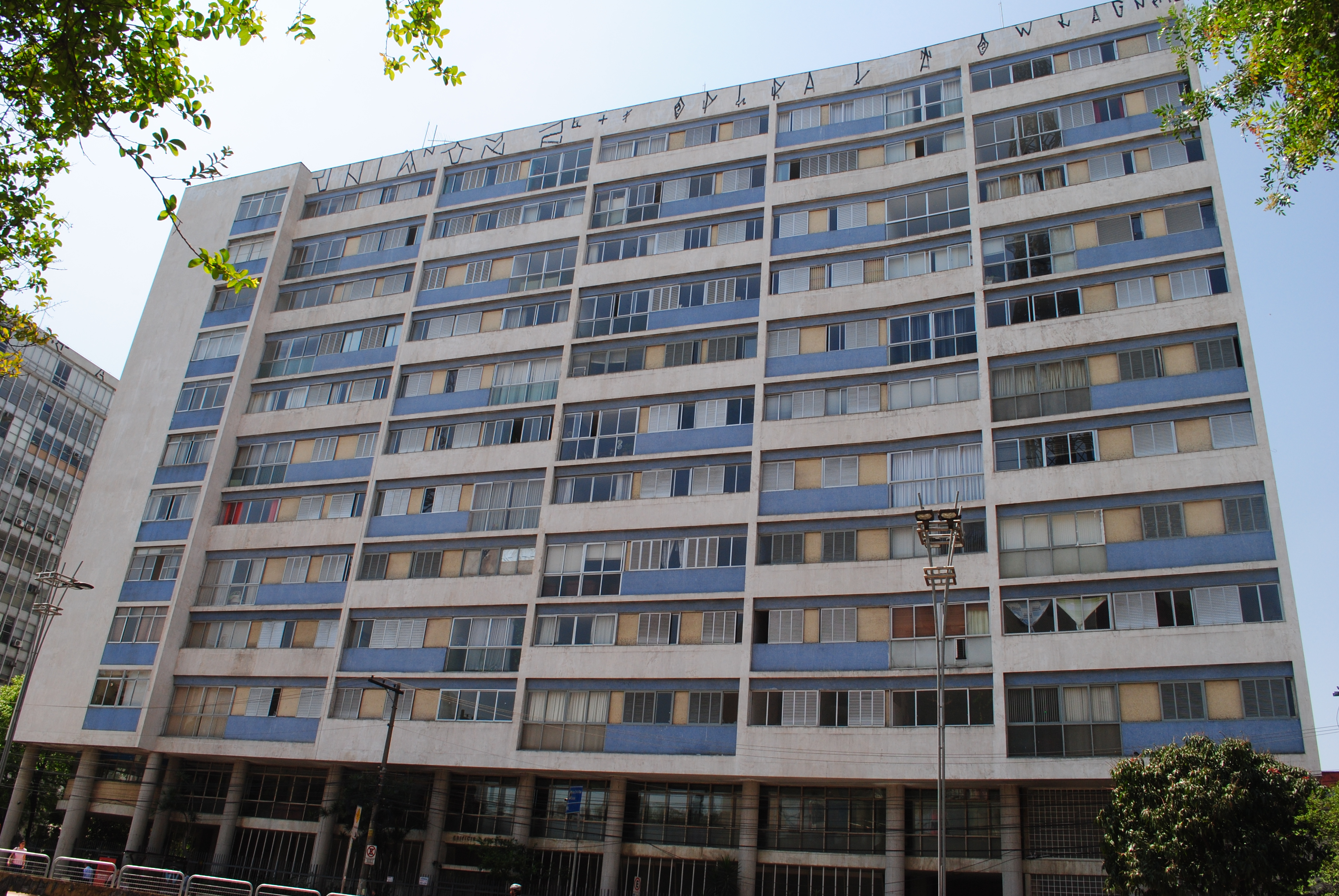 Frente Edifício Anchieta com face para a Avenida Paulista